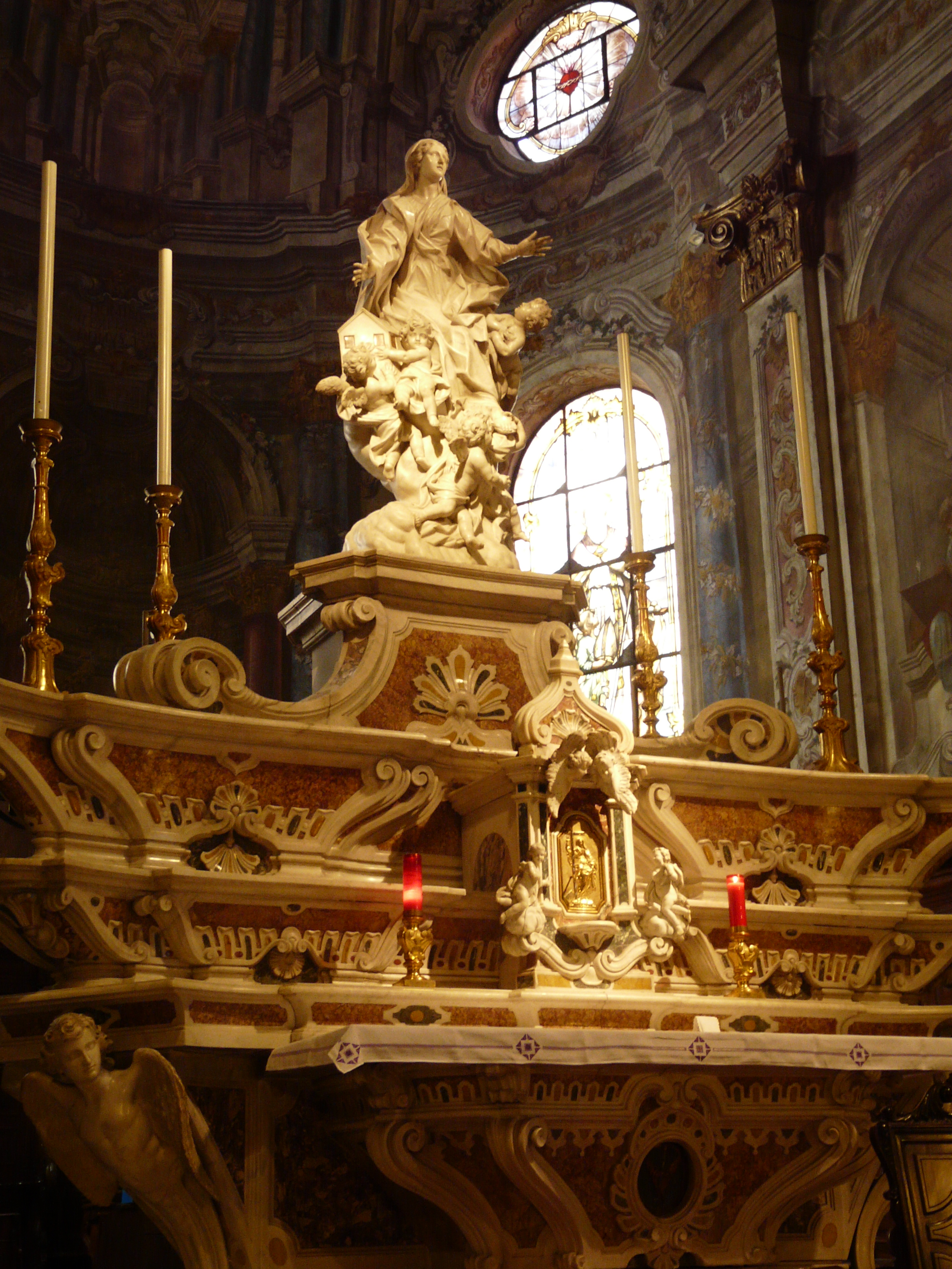 Altare maggiore della basilica di Santa Maria di Nazareth, Sestri Levante, Liguria, Italia